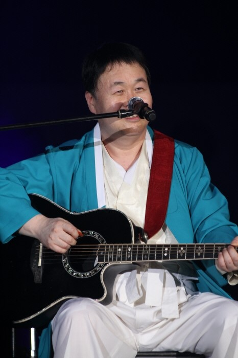 가수 송창식